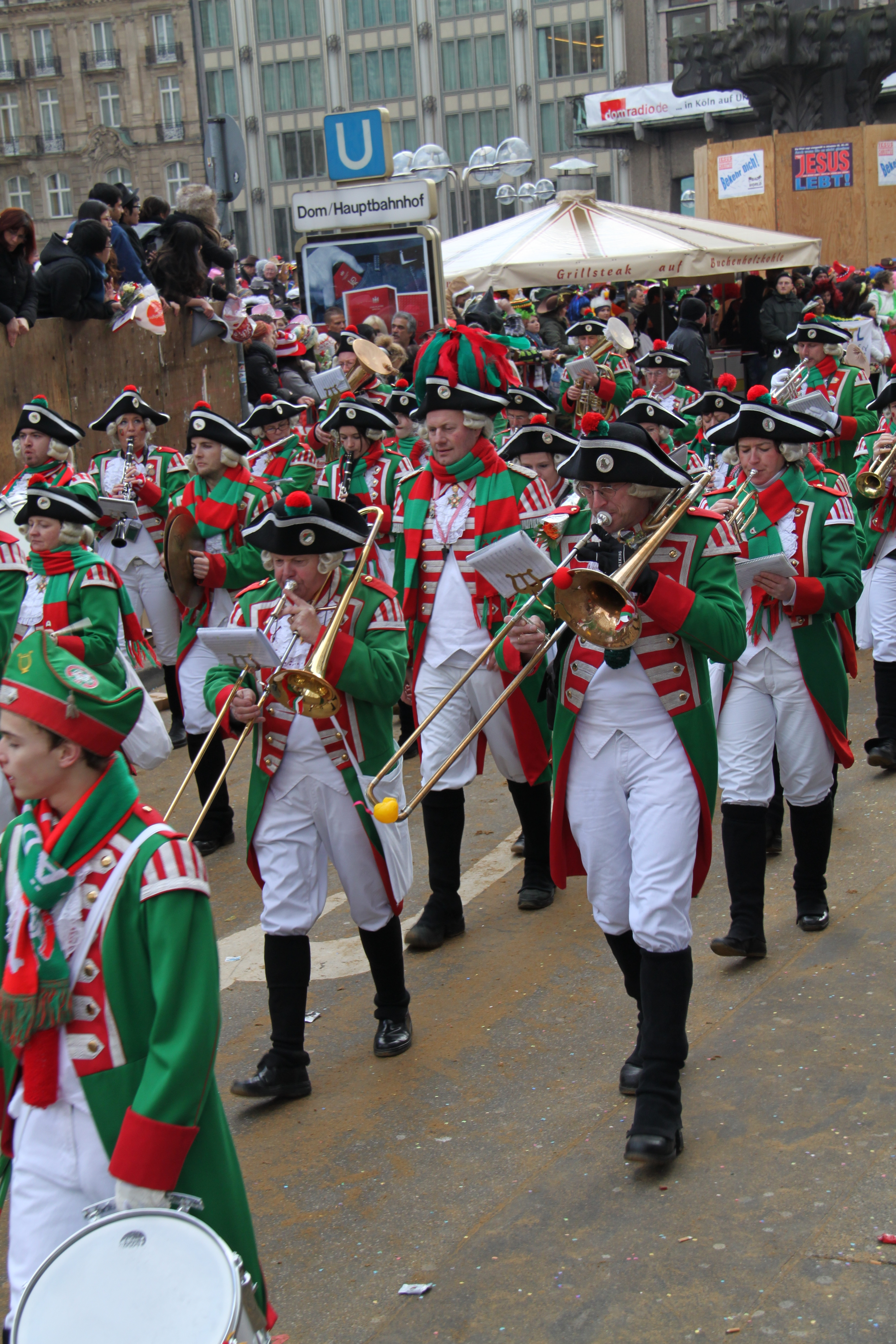 Rosenmontagszug Köln 2012